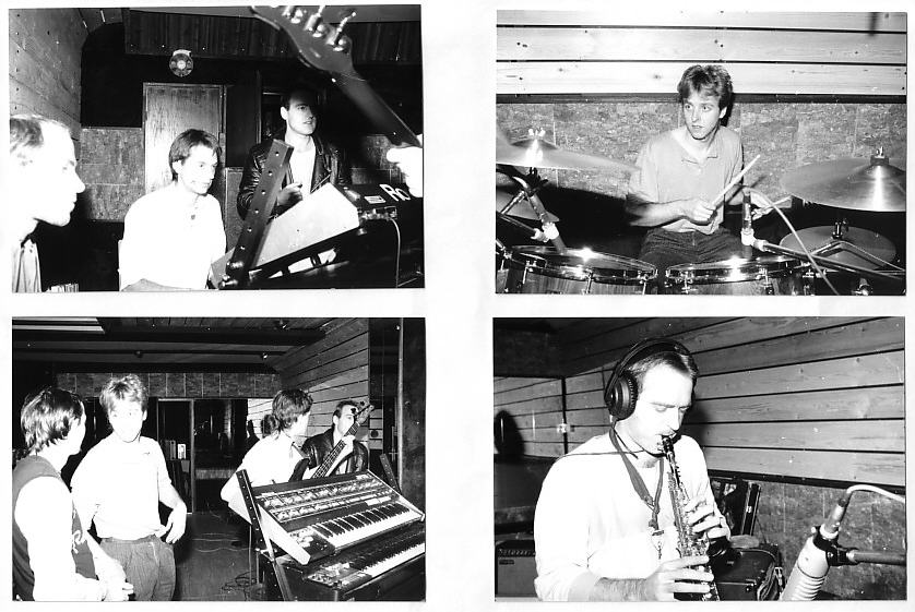 Schwoißfuaß 1984 im Proberaum Bieber, Offenbach in der Besetzung mit Andreas "Gottlob" Schmid am Schlagzeug und Michael Stoll am Bass